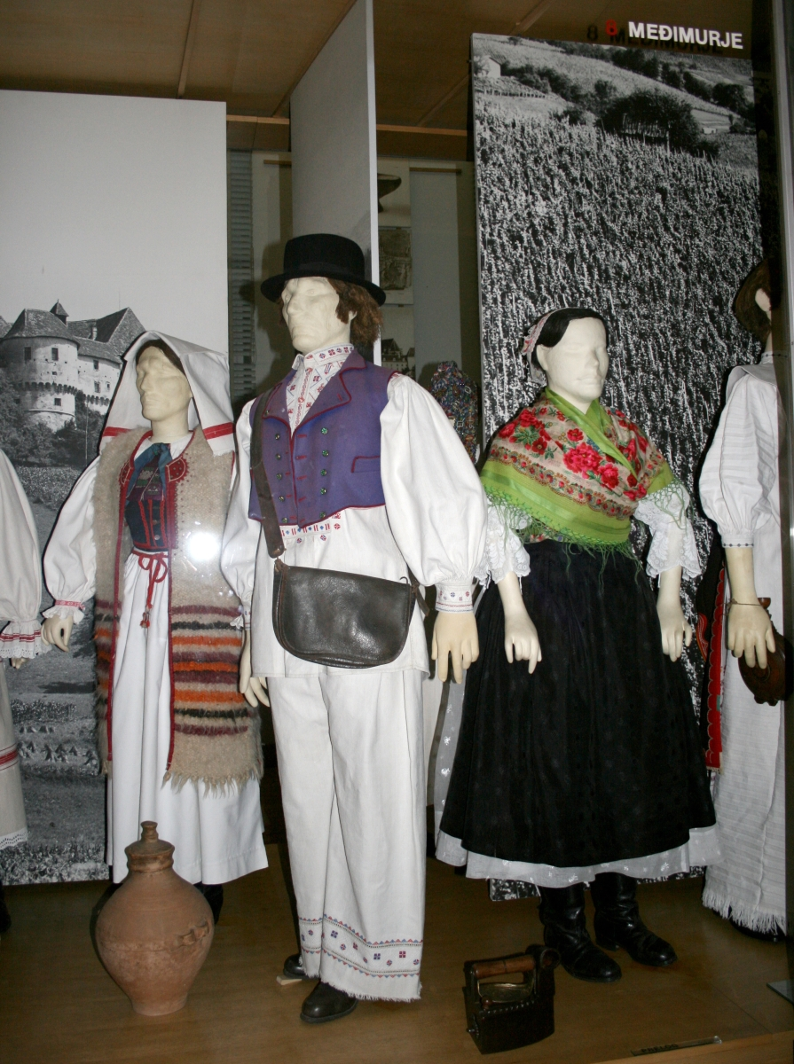 snimljeno tijekom Noći muzeja u Etnografskom muzeju u Zagrebu